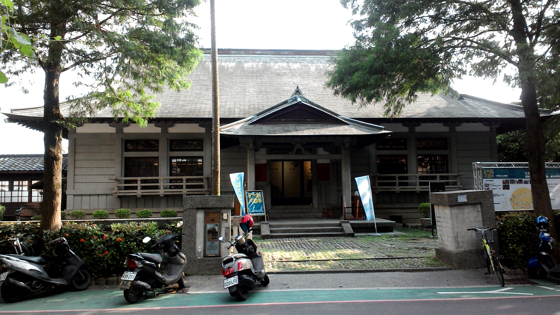 大溪武德殿,桃園市大溪區興和里